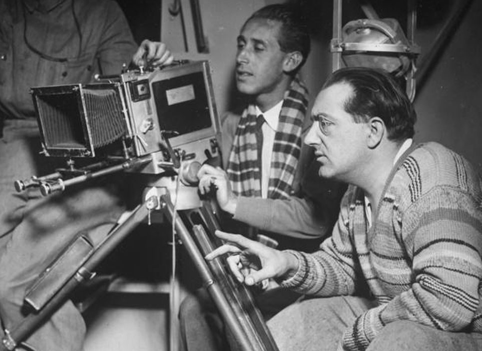 Title: Fritz Lang bei Dreharbeiten Extra information: Recherche und Fotovergleiche ergaben, dass der Kameramann Curt Courant ist. --188.192.205.158 21:37, 12 February 2010 (UTC) People in the image: Lang, Fritz: Filmregisseur, Österreich Factual corrections and alternative descriptions are encouraged separately from the original description. Additionally errors can be reported at this page to inform the Bundesarchiv. Original historic description: "Die Frau im Mond" Der bekannte Regisseur Fritz Lang bei den Aufnahmen des Weltraum-Films "Frau im Mond", dessen Uraufführung mit grosser Spannung entgegen gesehen wird.